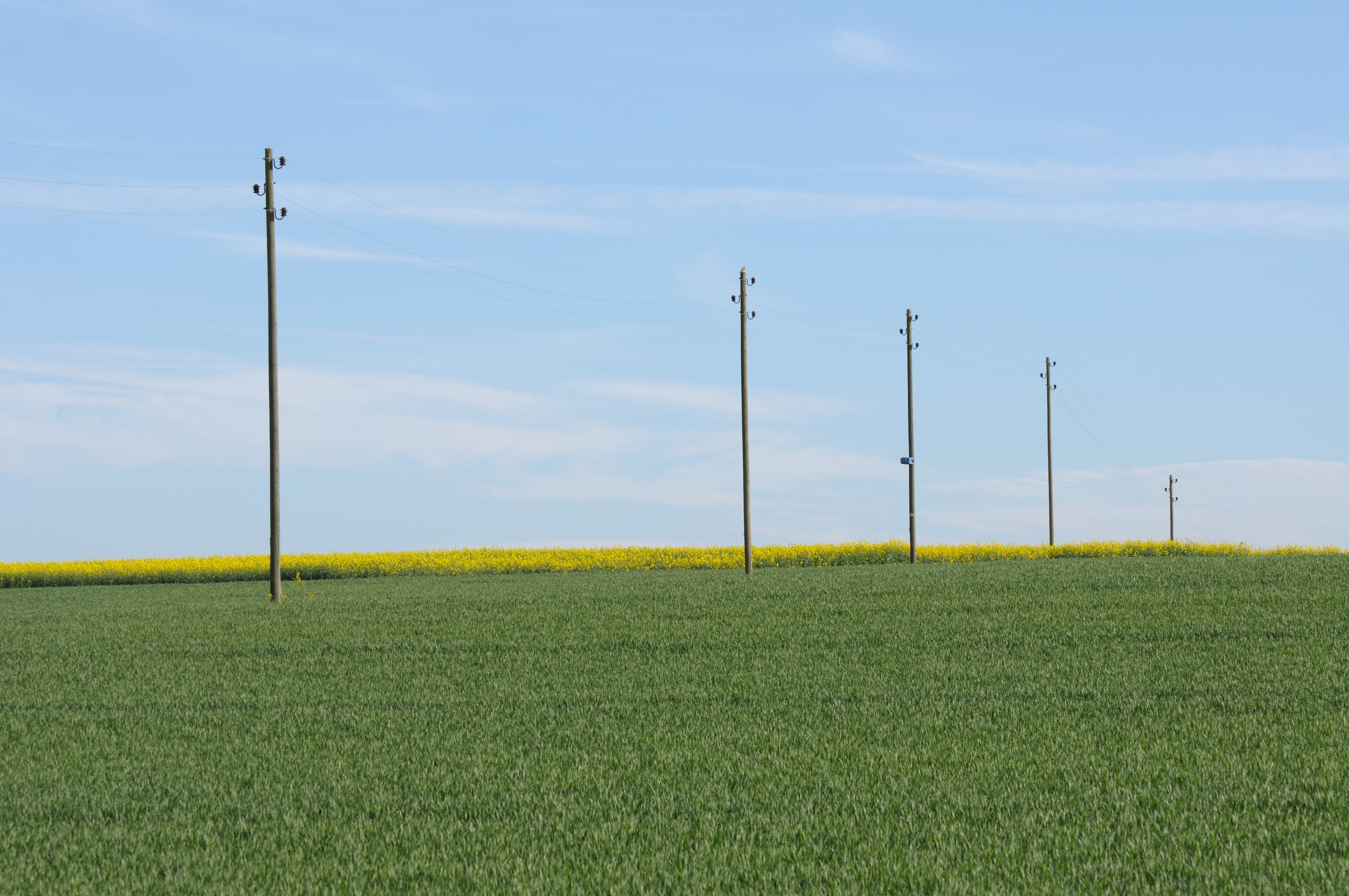 Switzerland, Canton of Schaffhausen, spring day in Dörflingen